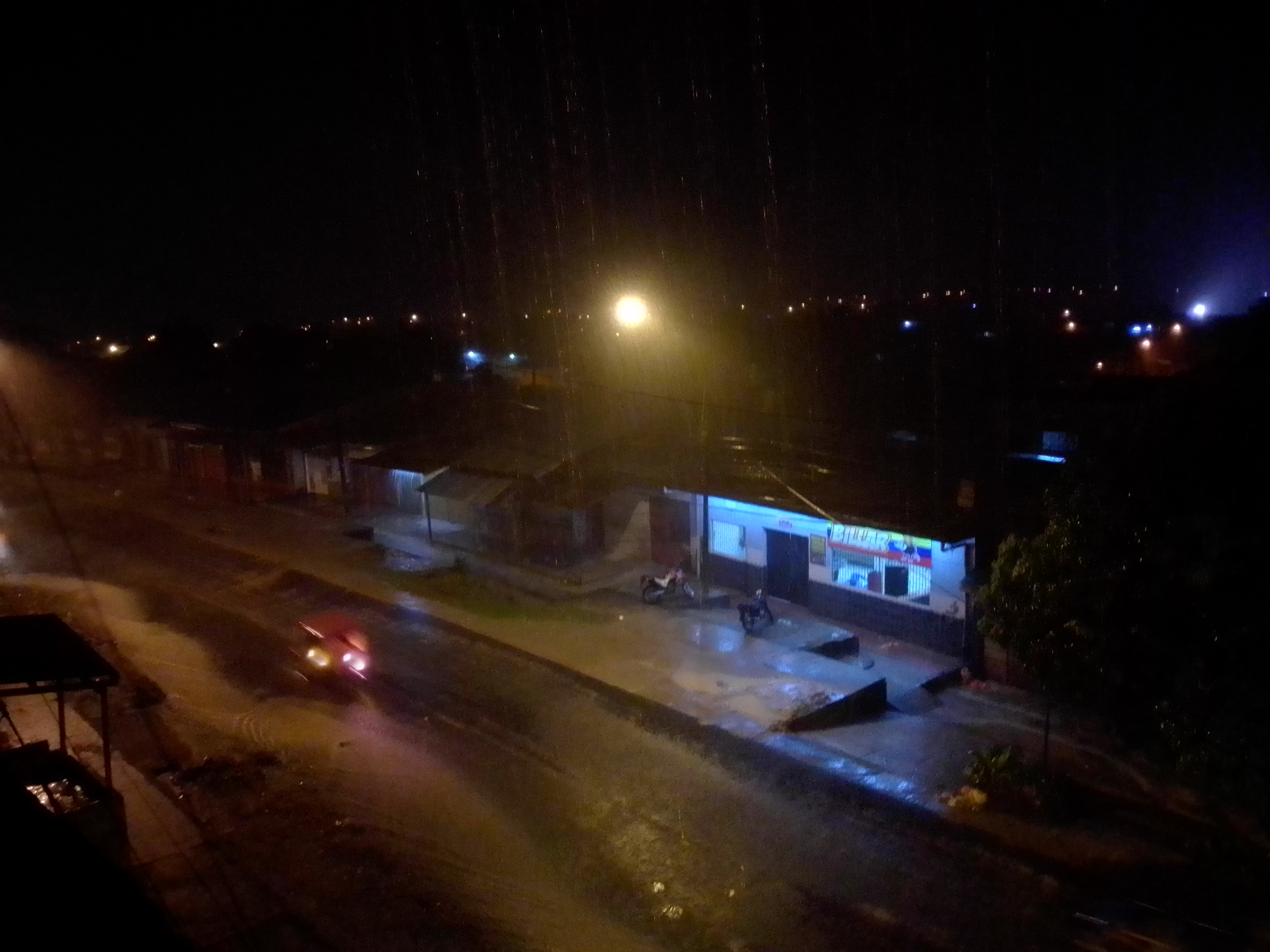 Lluvias en Iquitos